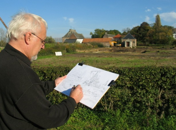 Steven - Vlaams kunstenaar - eigen foto. Steven aan het werk in de Abdij van Herkenrode (27 okt 2005)